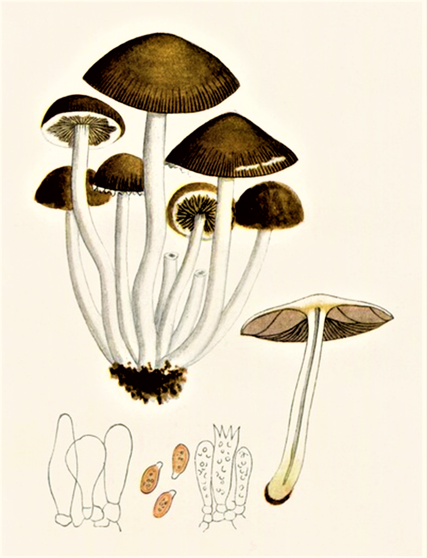 Giacomo Bresadola: Hypholoma hydrophila (Bull., 1791) Quél. (1886), heute Psathyrella piluliformis (Bull) P.D.Orton (1969)